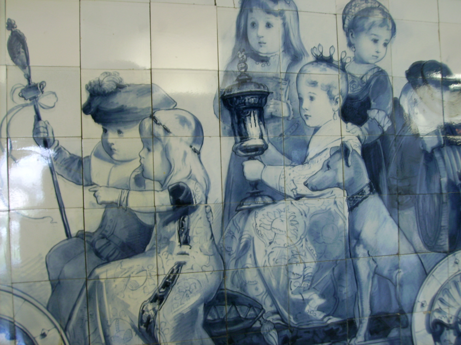 Wandfliesen in Delfter Blau. De Porceleyne Fles (vollständig De Koninklijke Delftsche Aardewerkfabriek „De Porceleyne Fles Anno 1653“ N.V., dt. wörtl. Die Königliche Porzellanflasche, engl. bekannt als Royal Delft) ist eine Delfter Porzellanmanufaktur mit einem Porzellanmuseum. Die 1653 gegründete Manufaktur ist ursprünglich für ihre als Delfter Blau oder Delfter Ware bezeichneten Fayencen bekannt.